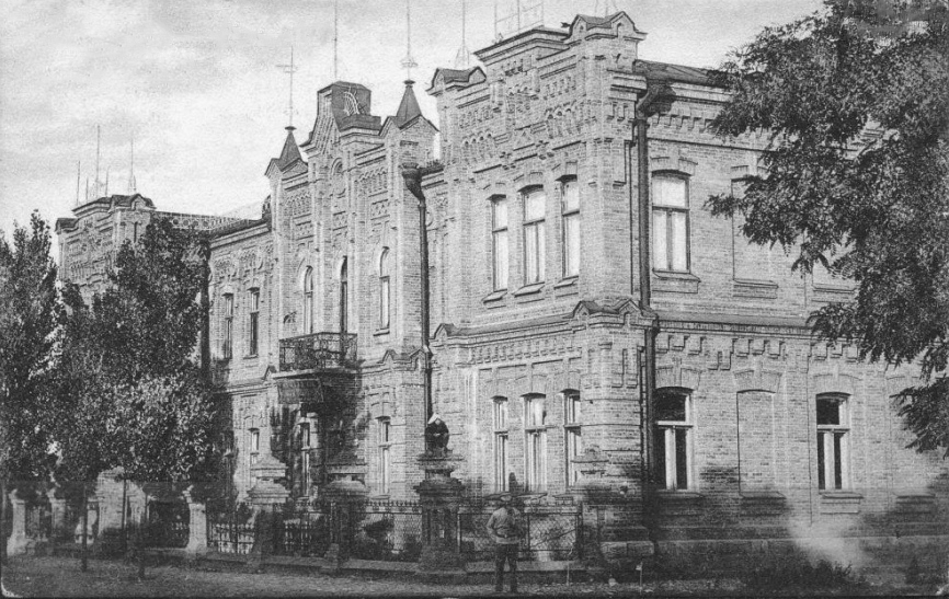 Грозный. Городское Пушкинское училище. Начало ХХ века